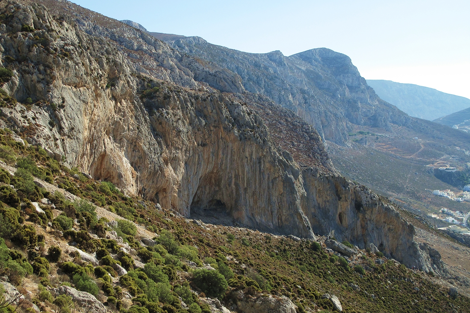 Kalymnos : le secteur Odyssey vu du secteur School